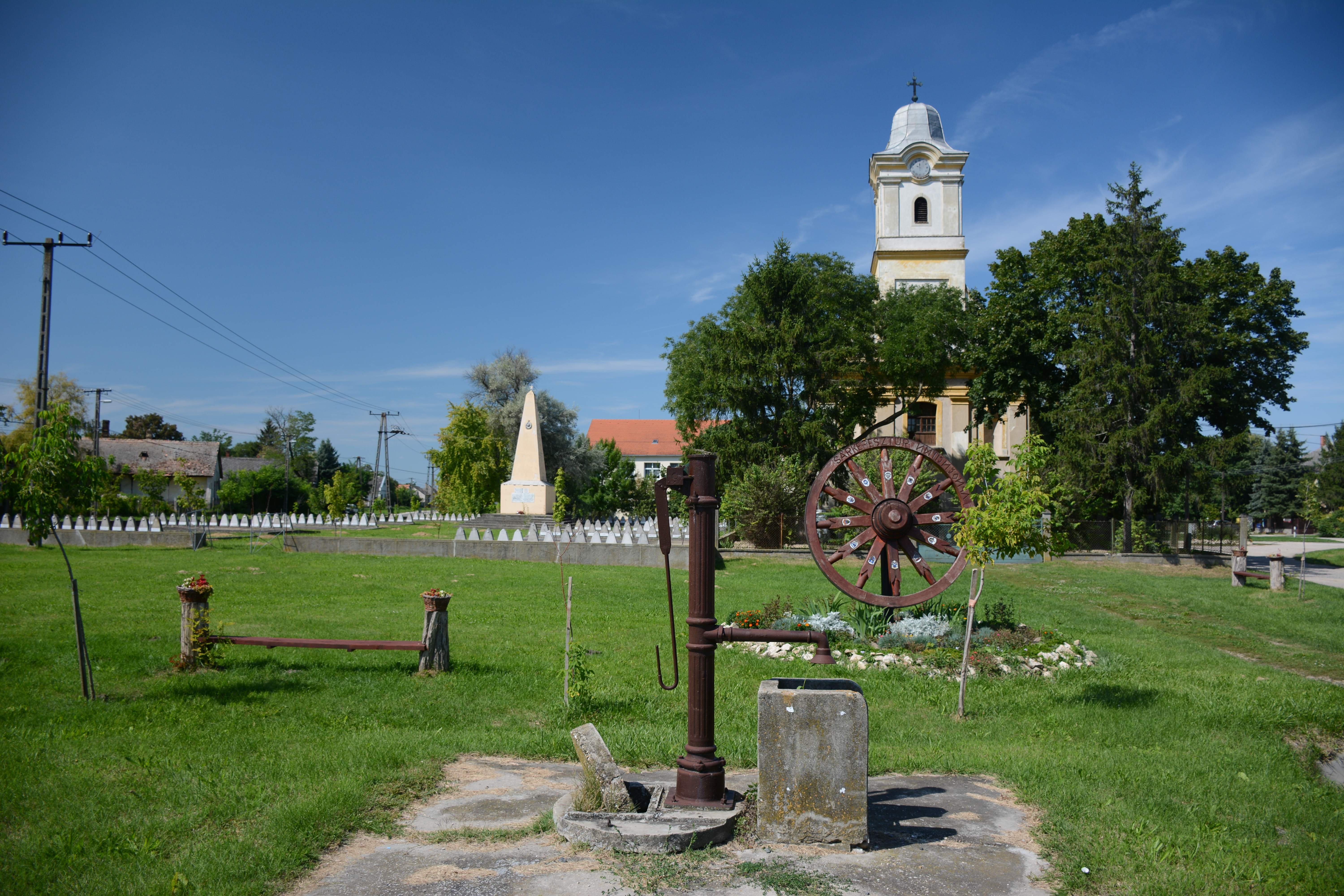 templom, emlékhely